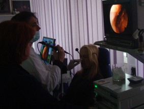 Fonijatrijski pregled korištenjem videostroboskopije i zvučnog zapisa